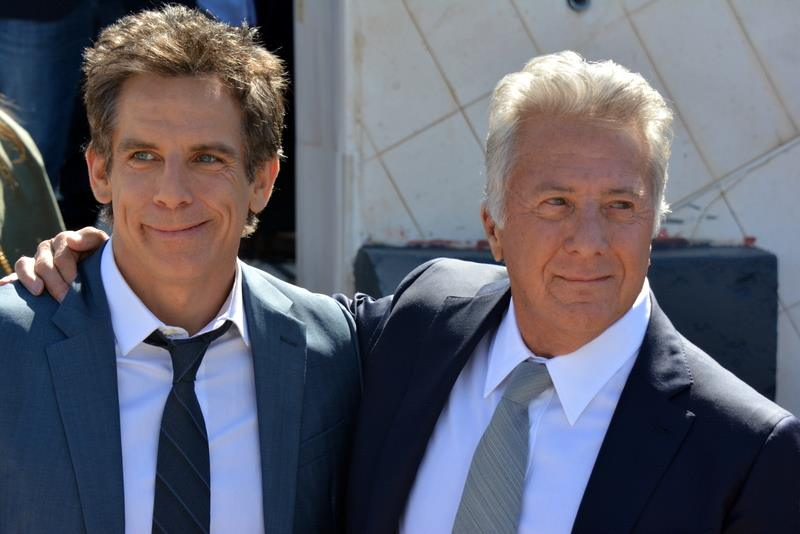 Ben Stiller et Dustin Hoffman au festival de Cannes